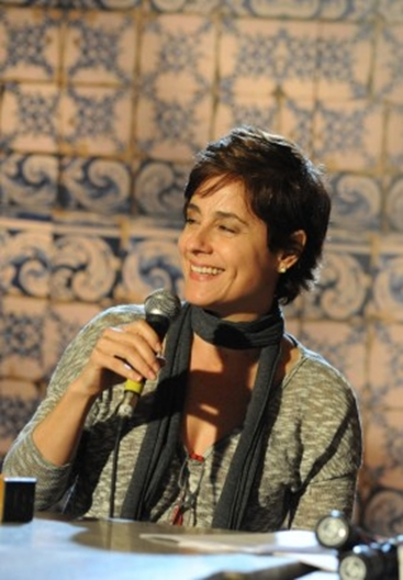 Soraya Ravenle, nome artístico de Soraya Jarlicht (Niterói, 28 de Novembro de 1963), é uma atriz e cantora brasileira.